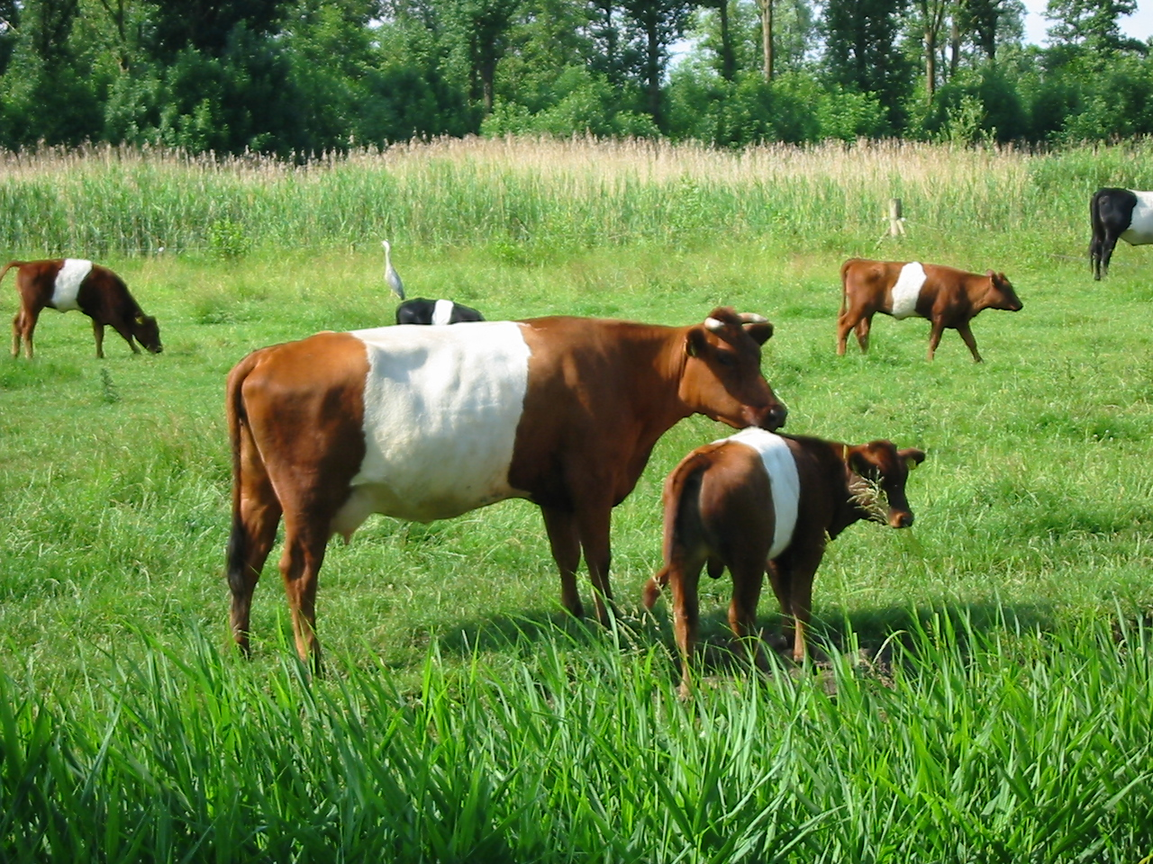 Zelfgemaakte foto op 20 juni 2006. Lakenvelders bij Leusden.